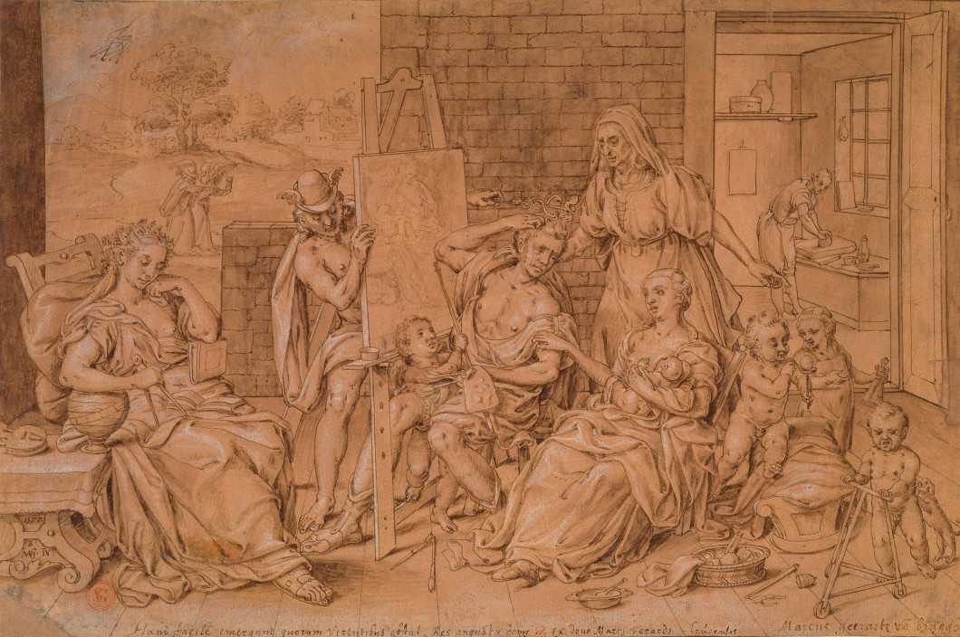 Drawing; Drawings